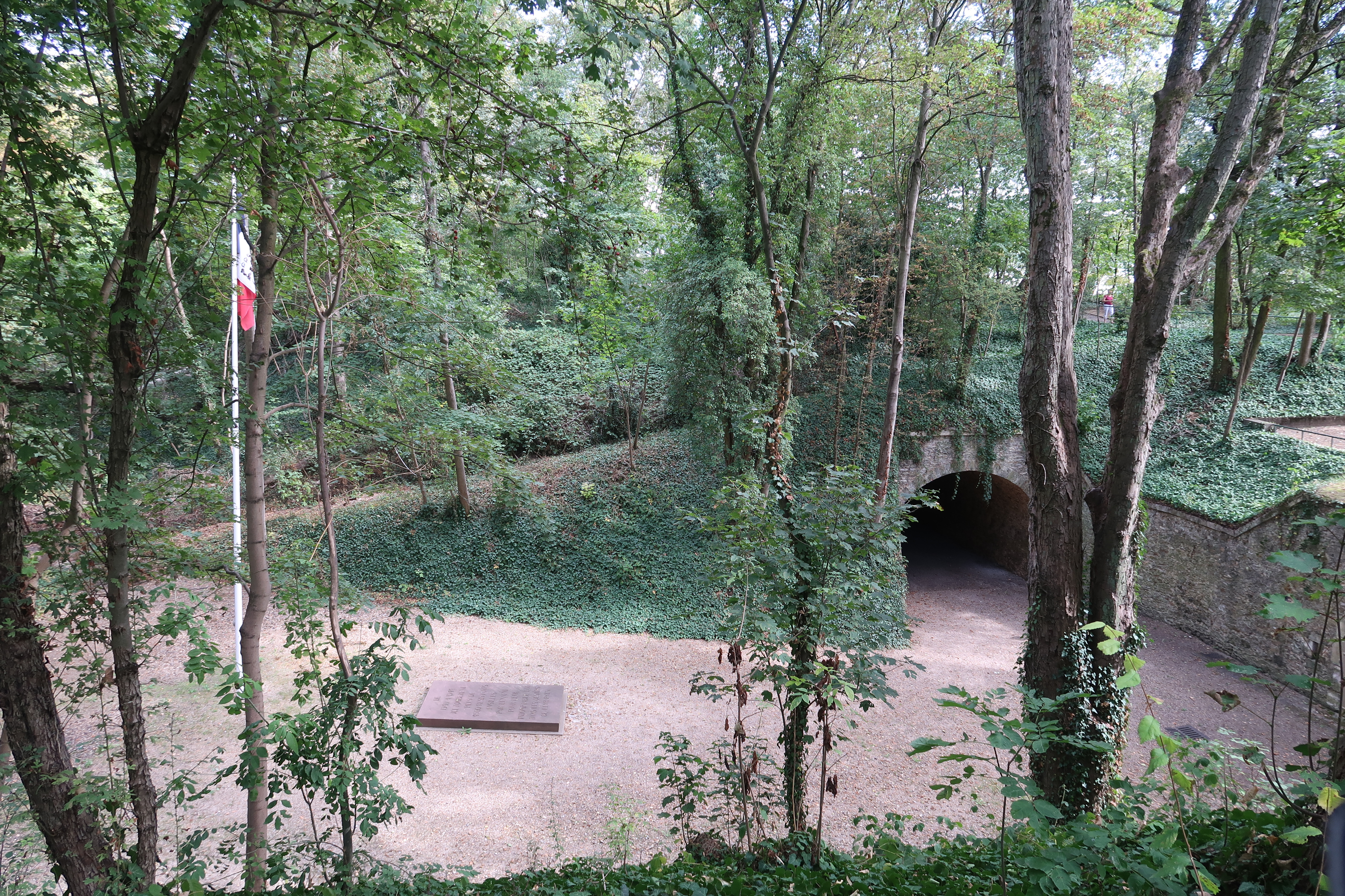 Clairière des fusillés du mont Valérien (Suresnes).